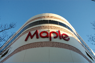 メイプル外観